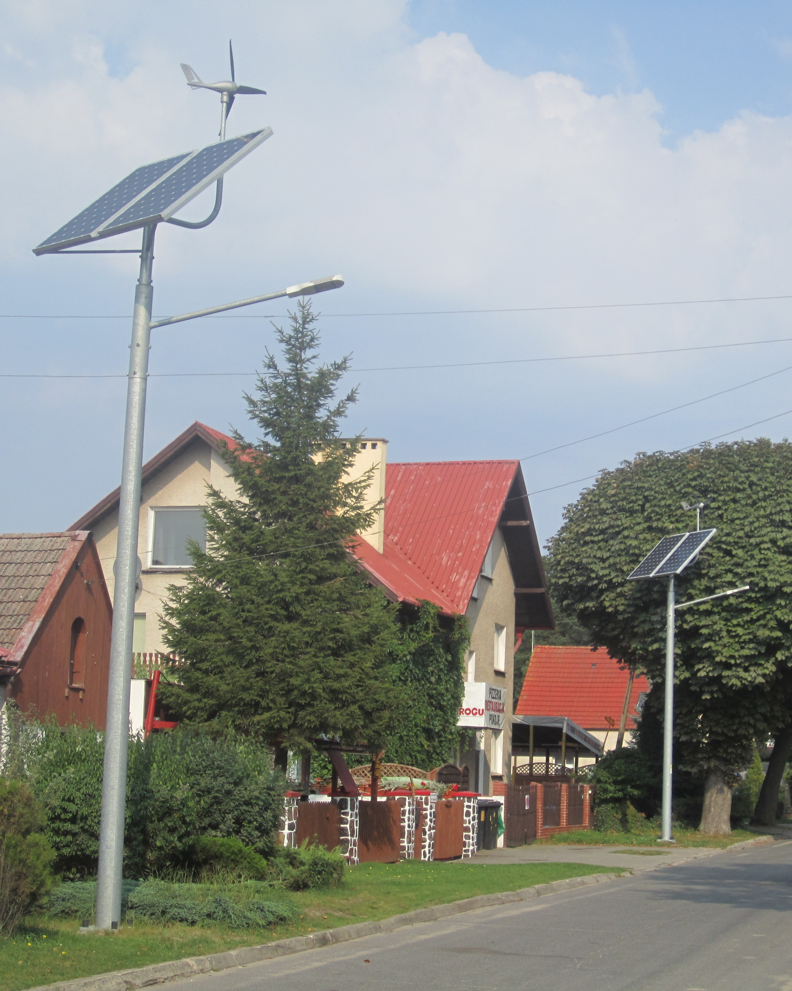 LED-Straßenlampen mit Solarzellen und Windkraftanlage in Dziwnów (deutsch Dievenow) in Polen